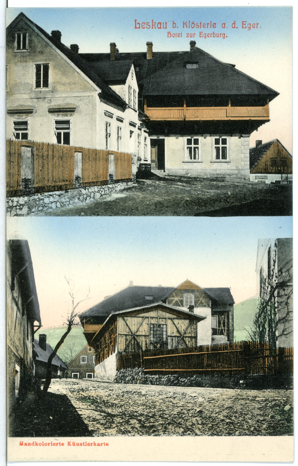 Leskau; Hotel zur Egerburg This postcard is from publisher Brück & Sohn in Meißen ( postcard has a unique number 11770 and is available in a higher resolution at the publisher. This images was uploaded in a cooperation project between Wikipedians and the publisher.